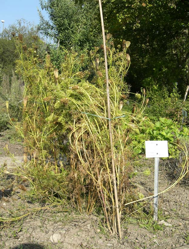 Ammi visnaga. botanic garden Göttingen / Germany.